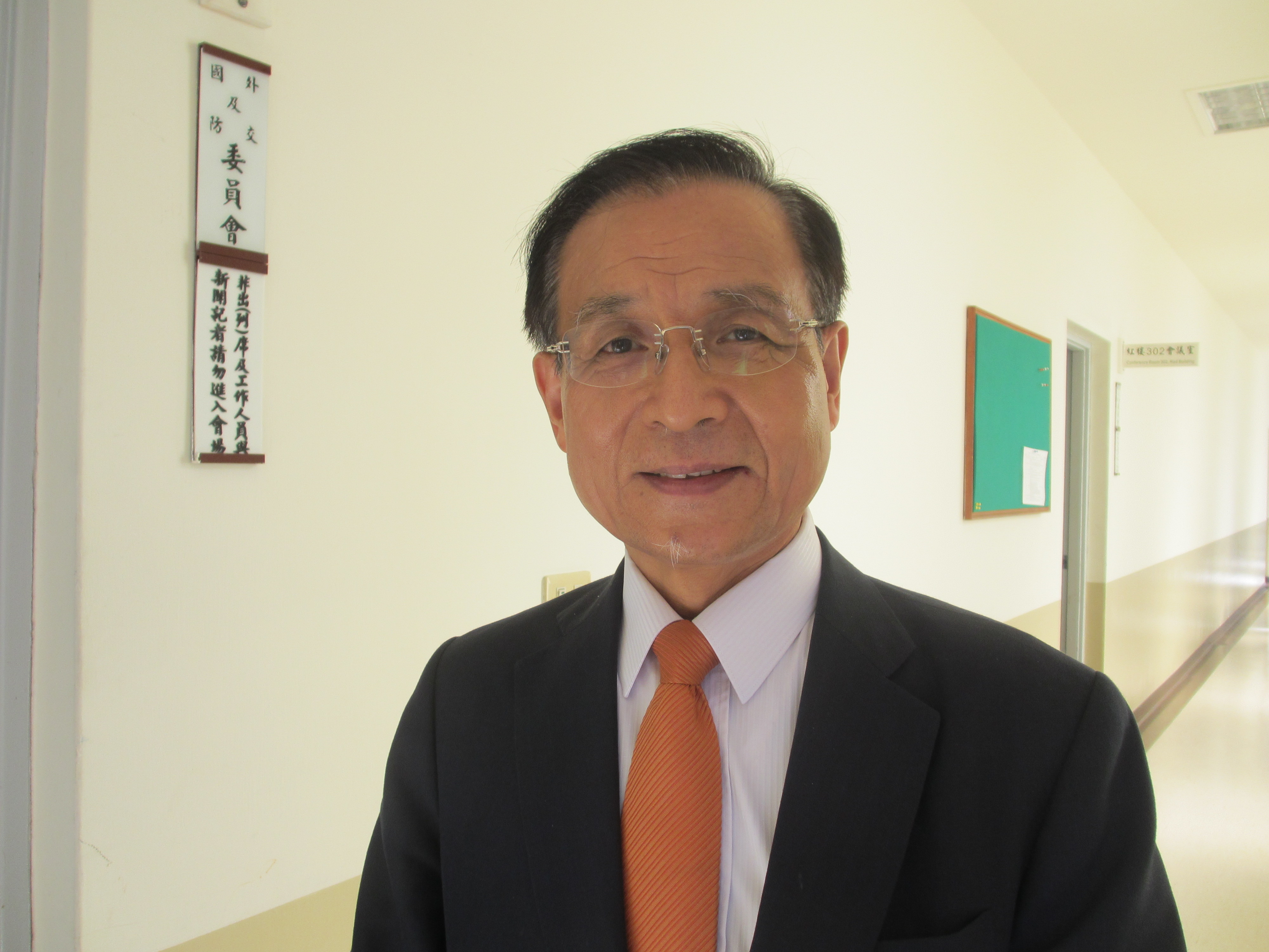 民主進步黨立法委員許添財。